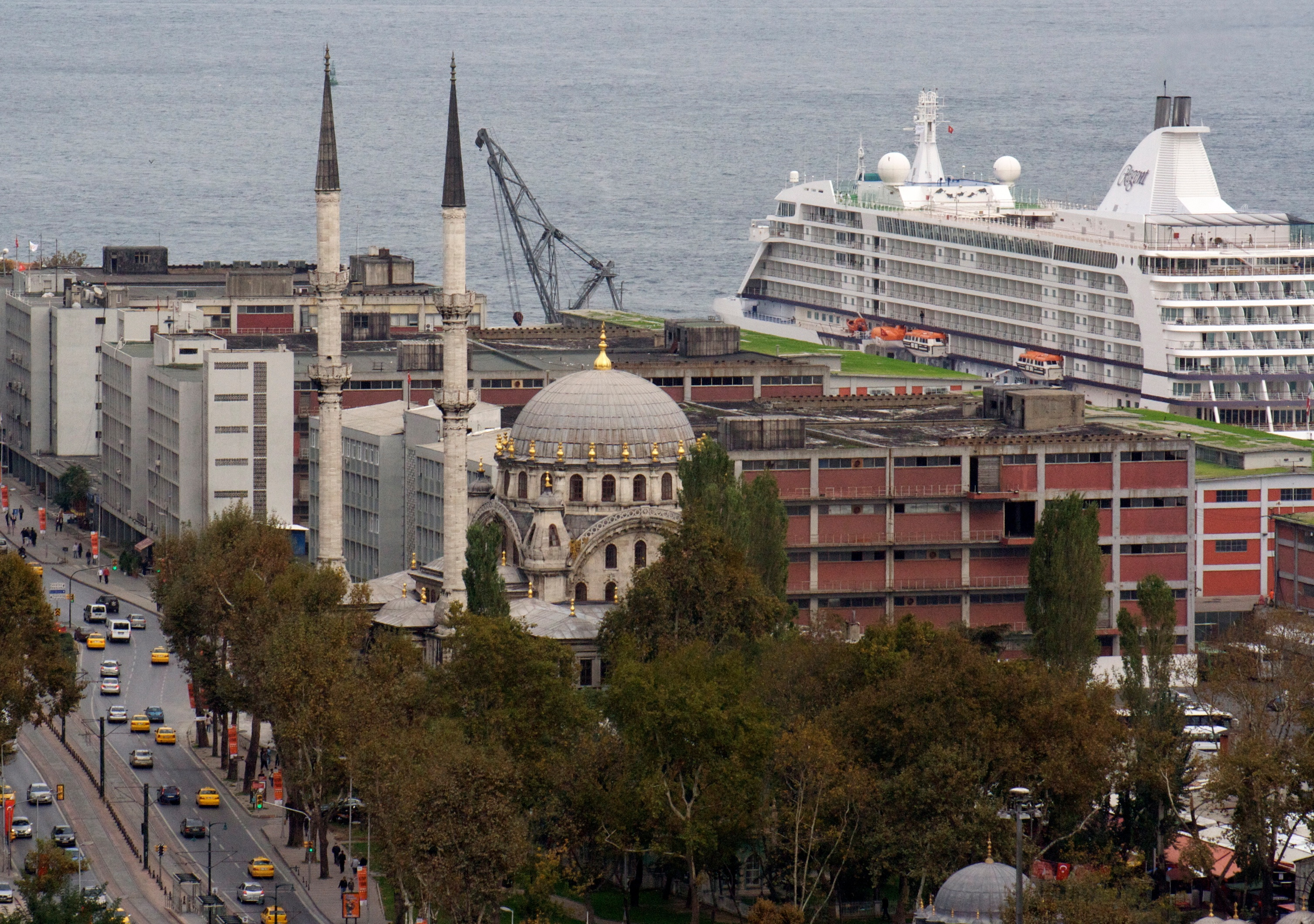 Tophane